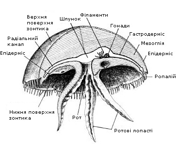 Вертикальний розріз сцифоїдної медузи